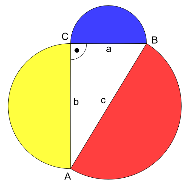 Möndchen des Hippokrates Andere Versionen: SVG auf Anfrage siehe auch: Bild:Moendchen-2.png, Bild:Moendchen-3.png